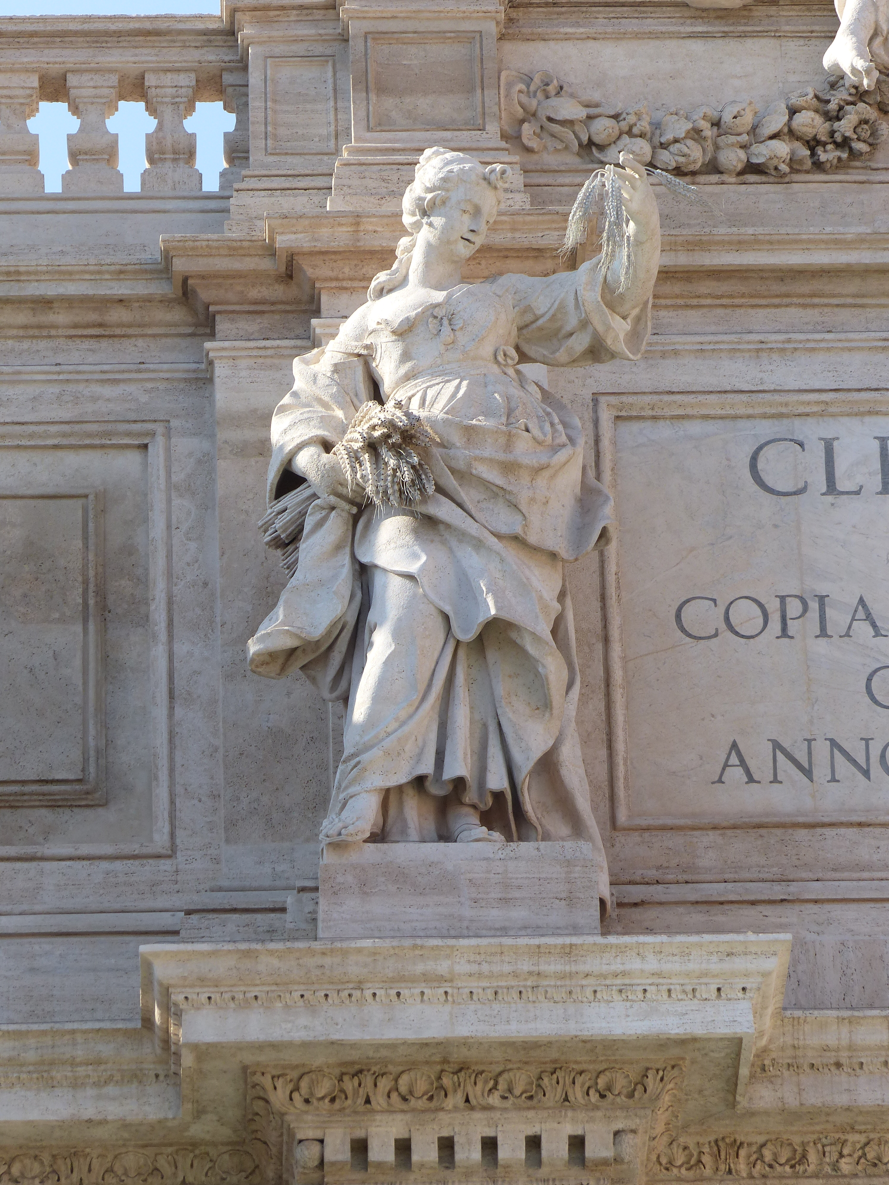 Fontana de Trevi, detalles.